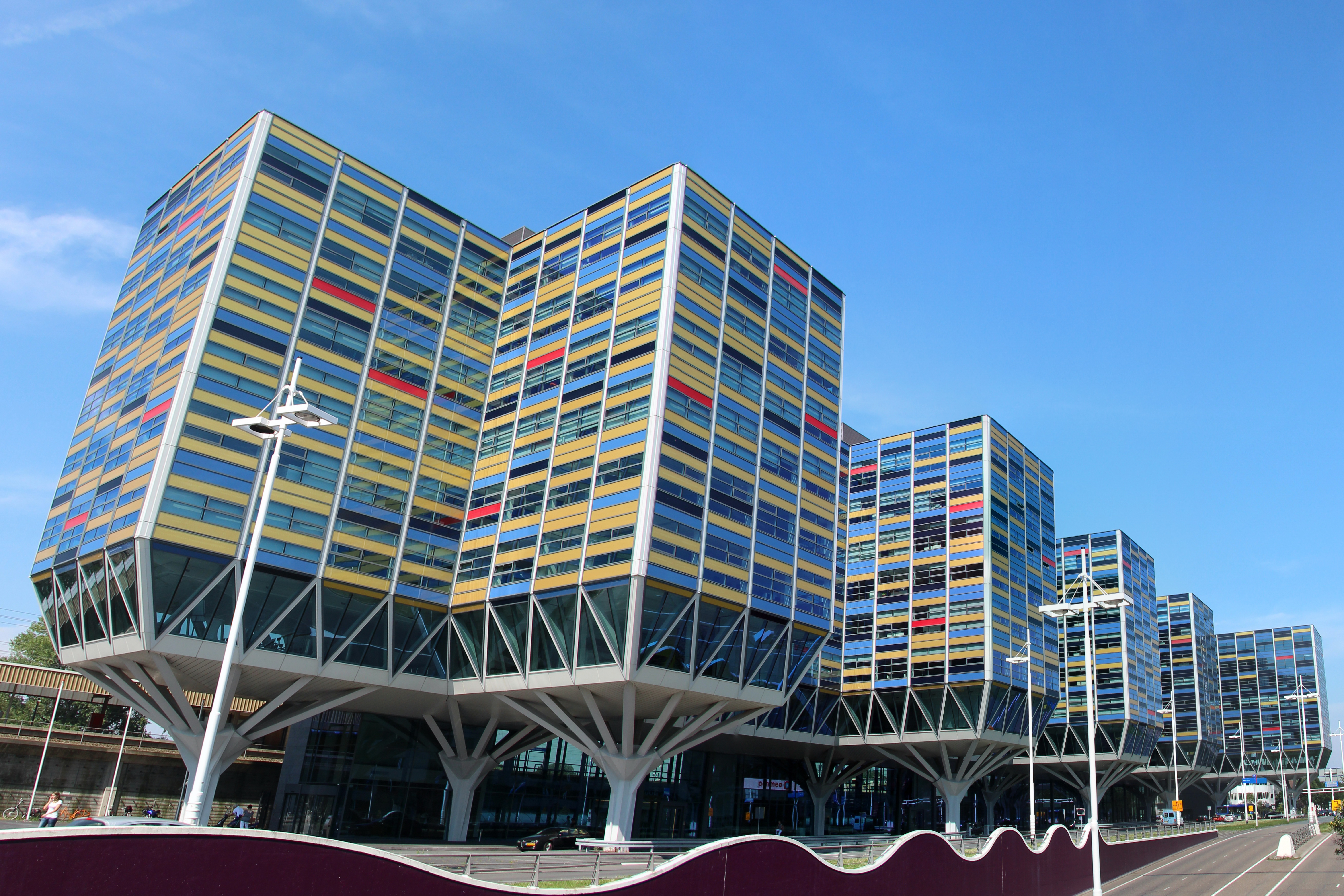 Gebouw Achmea in Leiden, zomer 2012